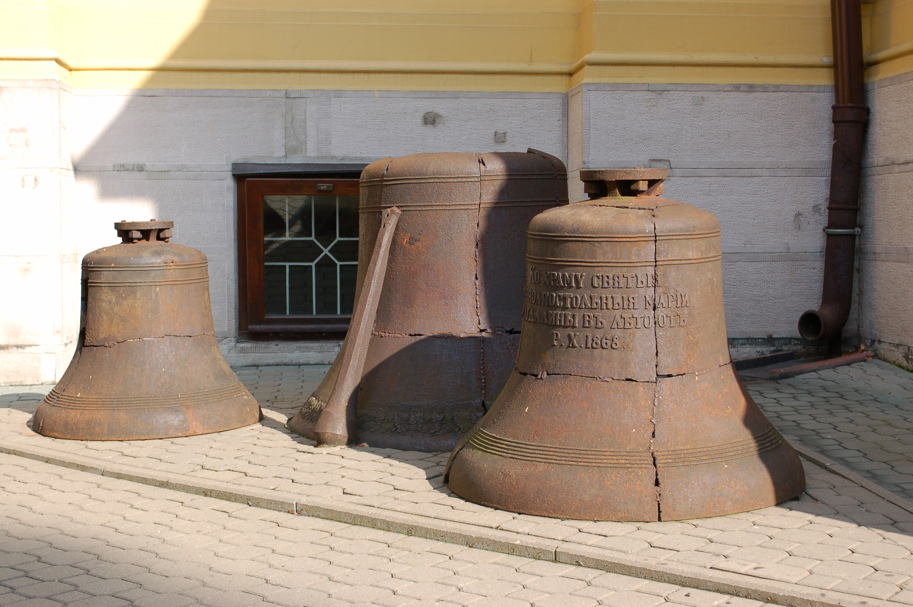 Praga